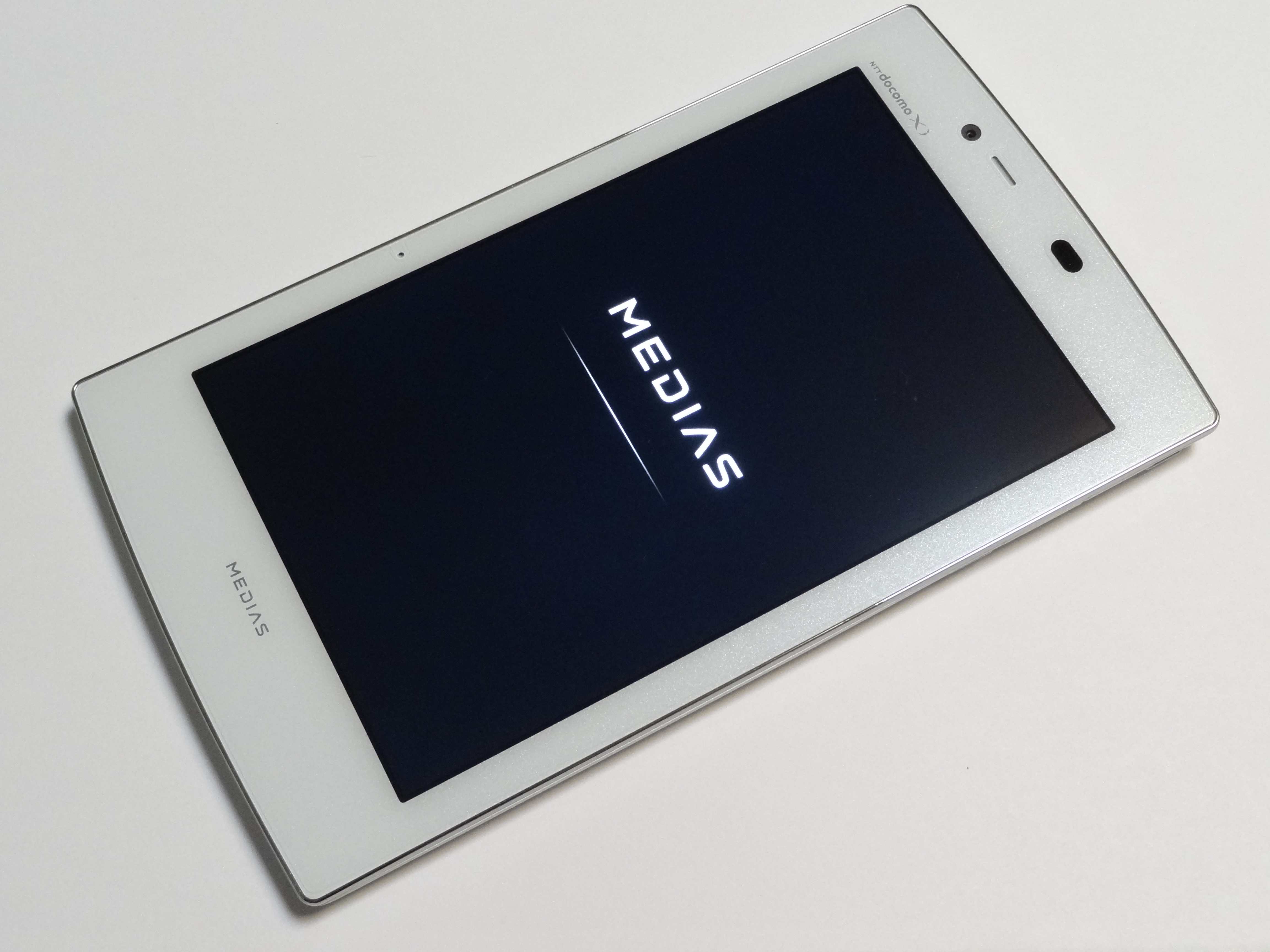 NTTドコモの第3.9世代移動通信システム（Xi）対応タブレット、「MEDIAS TAB UL N-08D」の画面側の写真です。平成24(2012)年11月7日撮影。